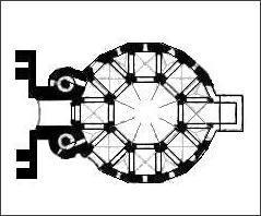 == Dozvola ==